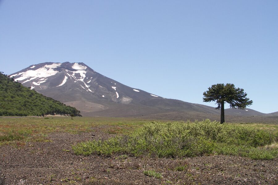 Volcano Lonquimay, Chile